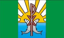 Bandeira do município baiano de Xique-Xique, Brasil.